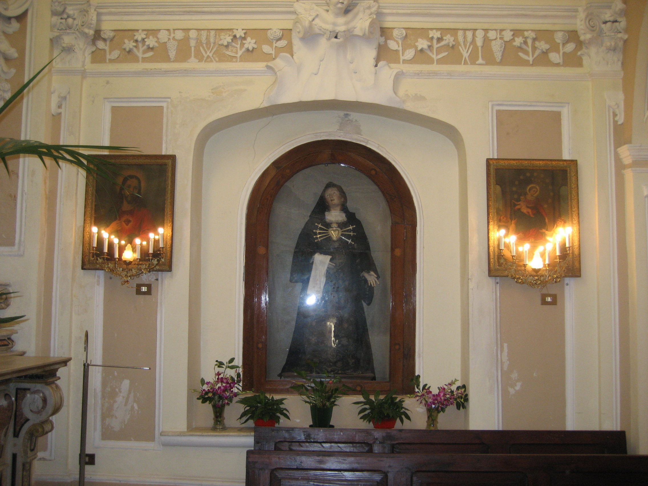 Chiesa di Sant'Antonio di Padova (Conca dei Marini): Statua della Madonna Addolorata facente parte del gruppo processionale.